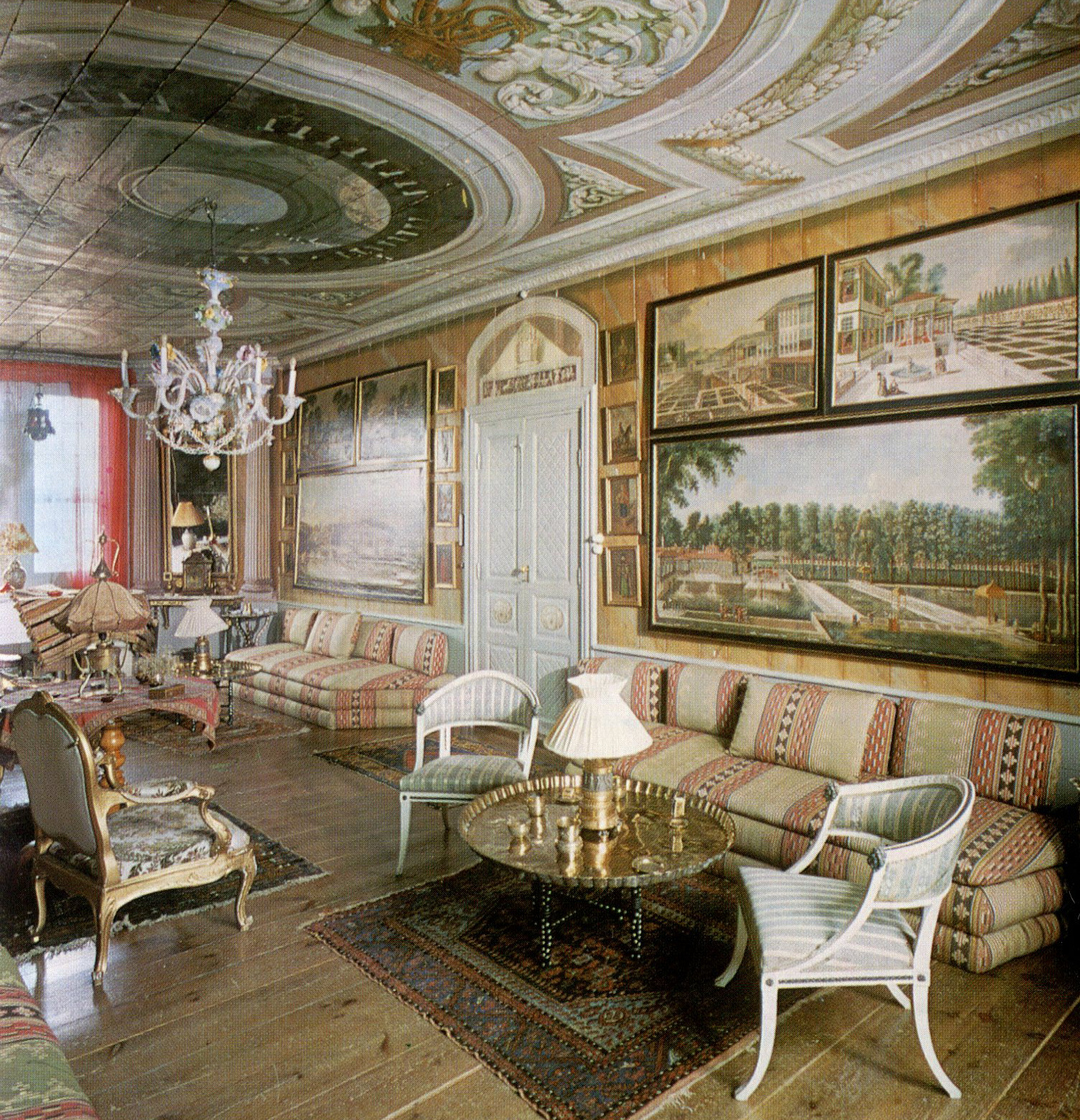 Biby gård, interiör, Turkiska rummet